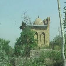 Тоҷикӣ: мазор